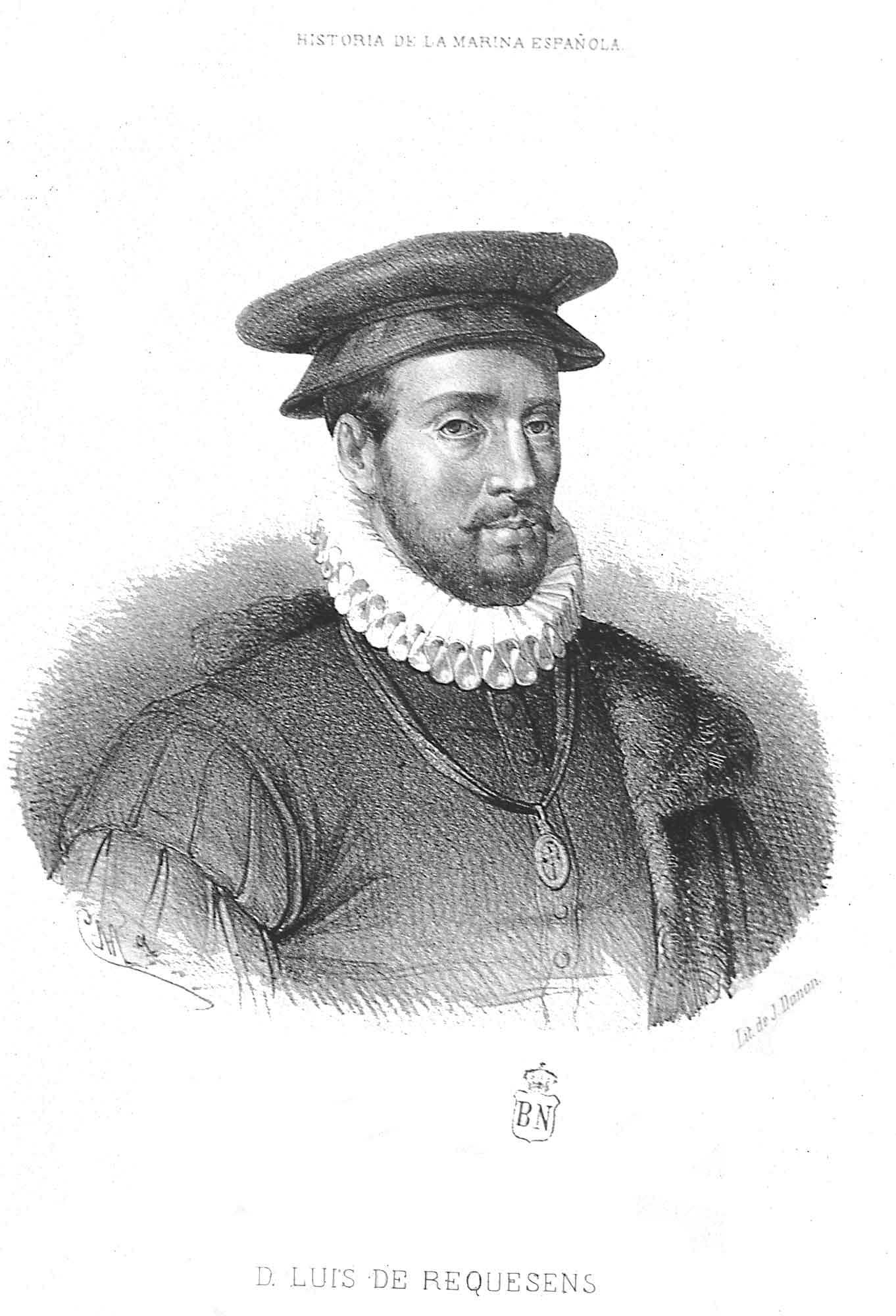 Retrato de Luis de Requesens y Zuñiga (1528-1576)